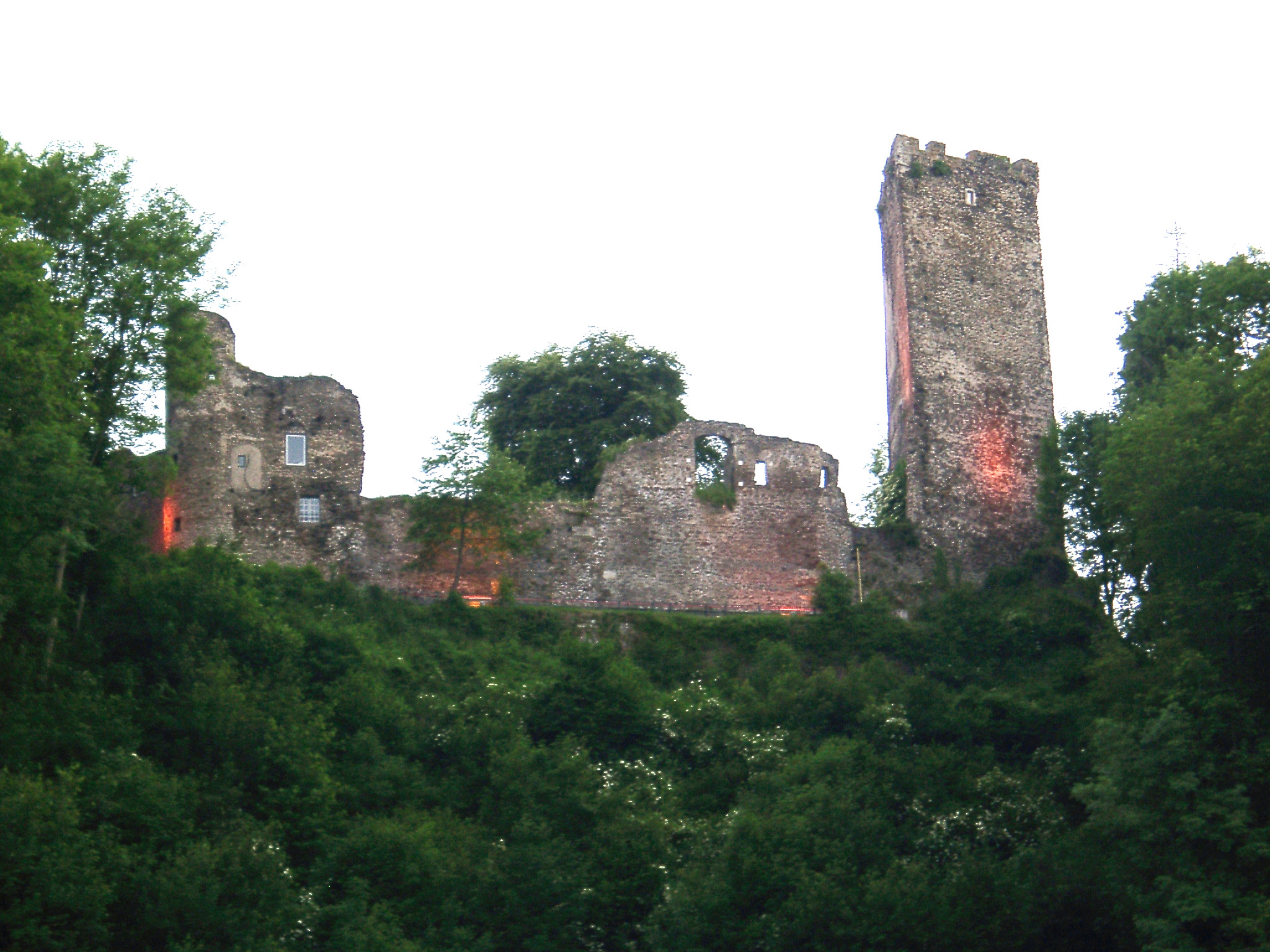 Burg Grenzau